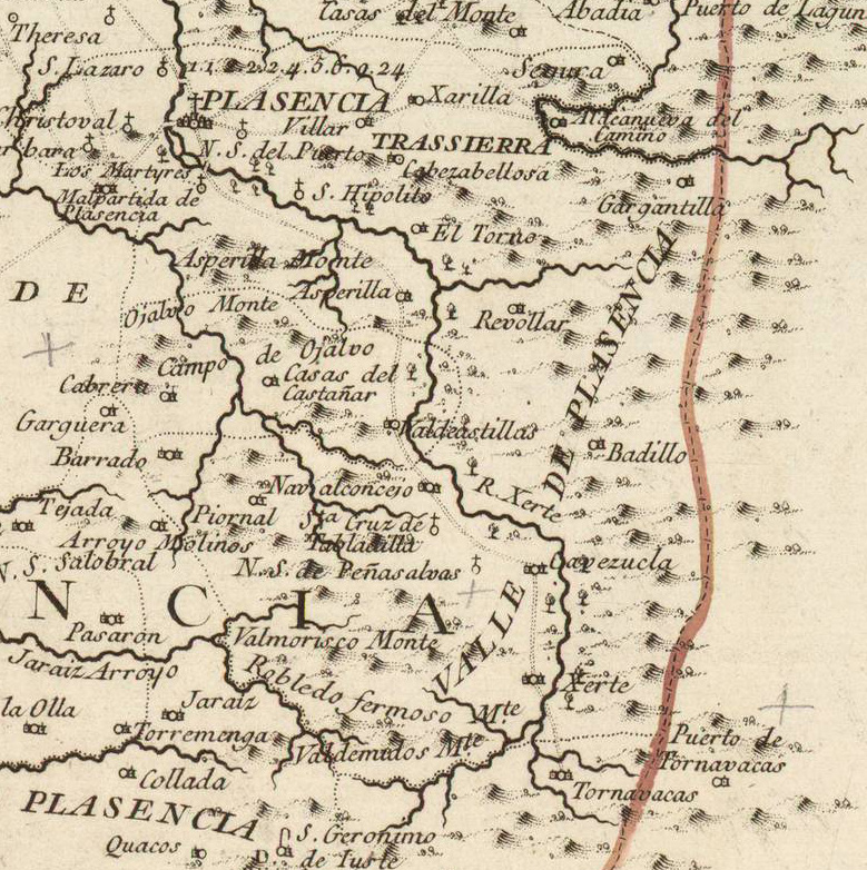 Valle del río Jerte (rotulado "valle de Plasencia") y alrededores en un mapa de la "provincia de Estremadura" publicado por Tomás López en 1766. Nótese que la orientación del mapa es inusual, con el oeste arriba.